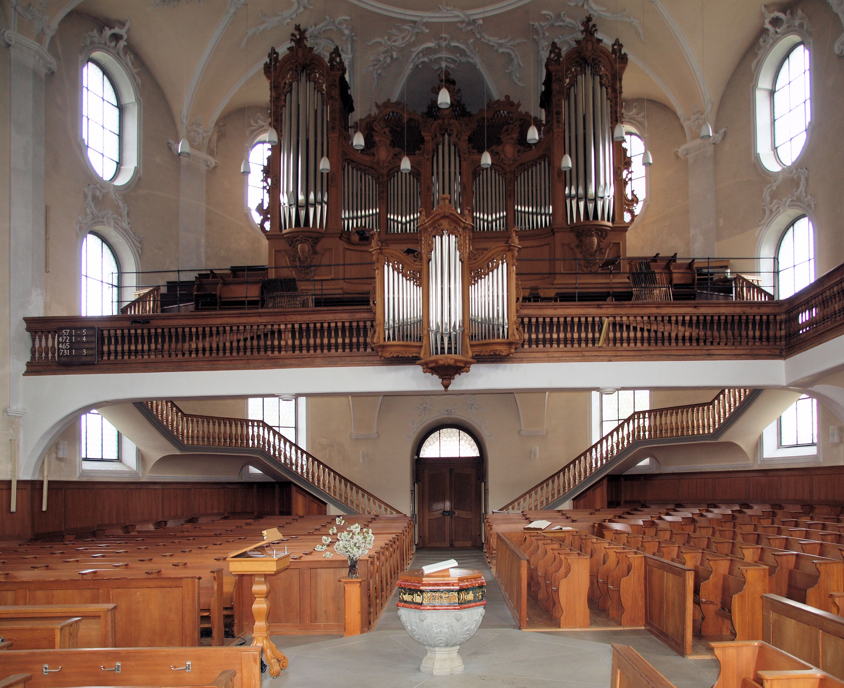 Der Innerraum der reformierten Kirche Horgen. Sicht auf die Orgelempore.